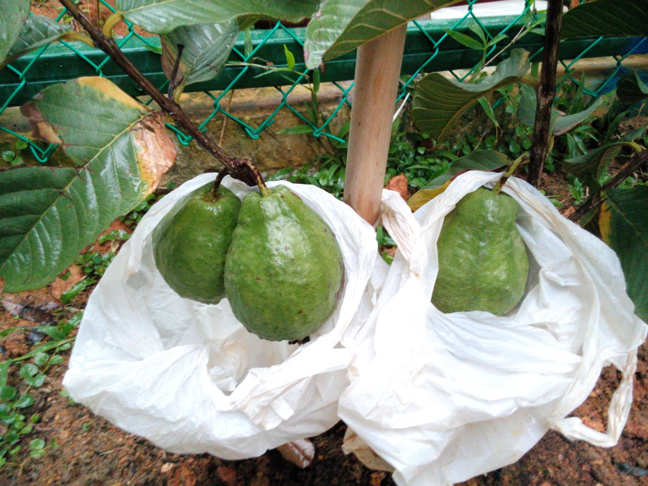 新加坡种植番石榴